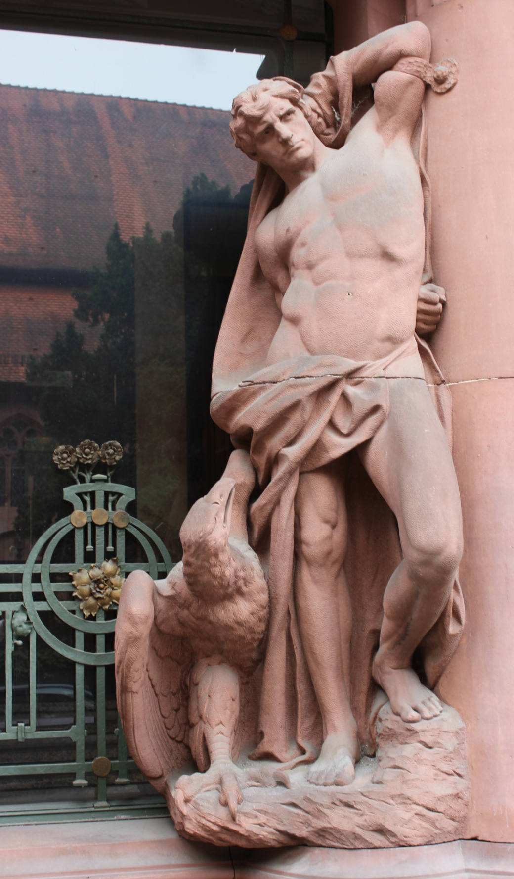 Prometheus brachte den Menschen das Feuer und wurde als Strafe von Zeus an den Kaukasus gekettet,wo ihm ein Adler täglich die Leber auffraß. Der gefesselte Prometheus symbolisiert die Grenzen menschlicher Erkenntnis